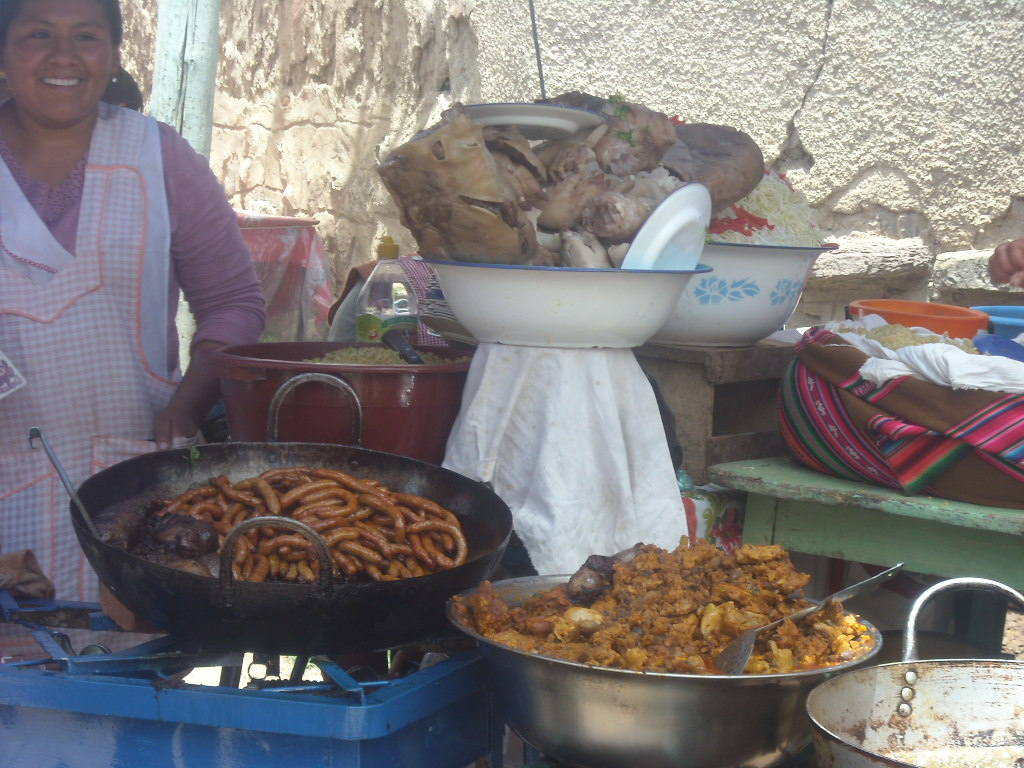 Tradicionales chorizos tarateños, forma parte de la culinaria de esta ciudad.